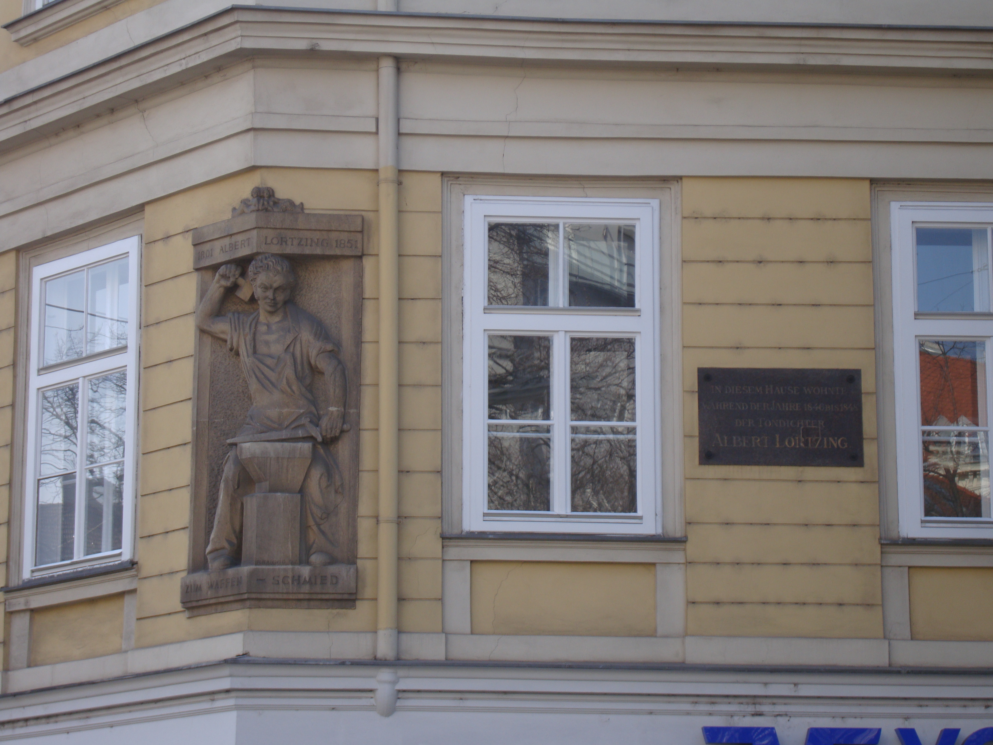 Waffenschmied-Relief und Gedenktafel am Wiener Wohnhaus Albert Lortzings in der Wiedner Hauptstraße